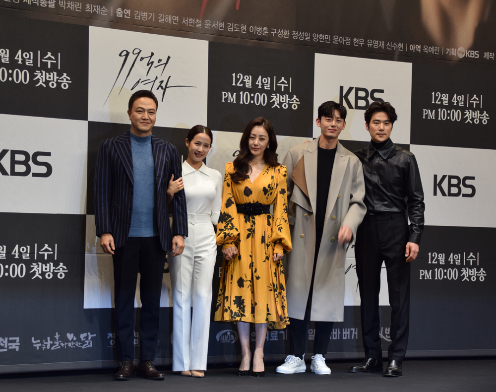 KBS드라마 '99억의 여자' 제작발표회 현장 (2019년 12월 3일)